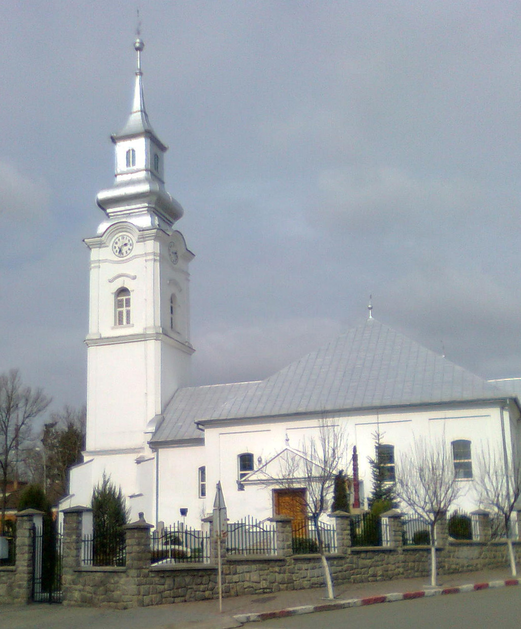 Református templom, MargittaRomână: Biserica reformată, Marghita.